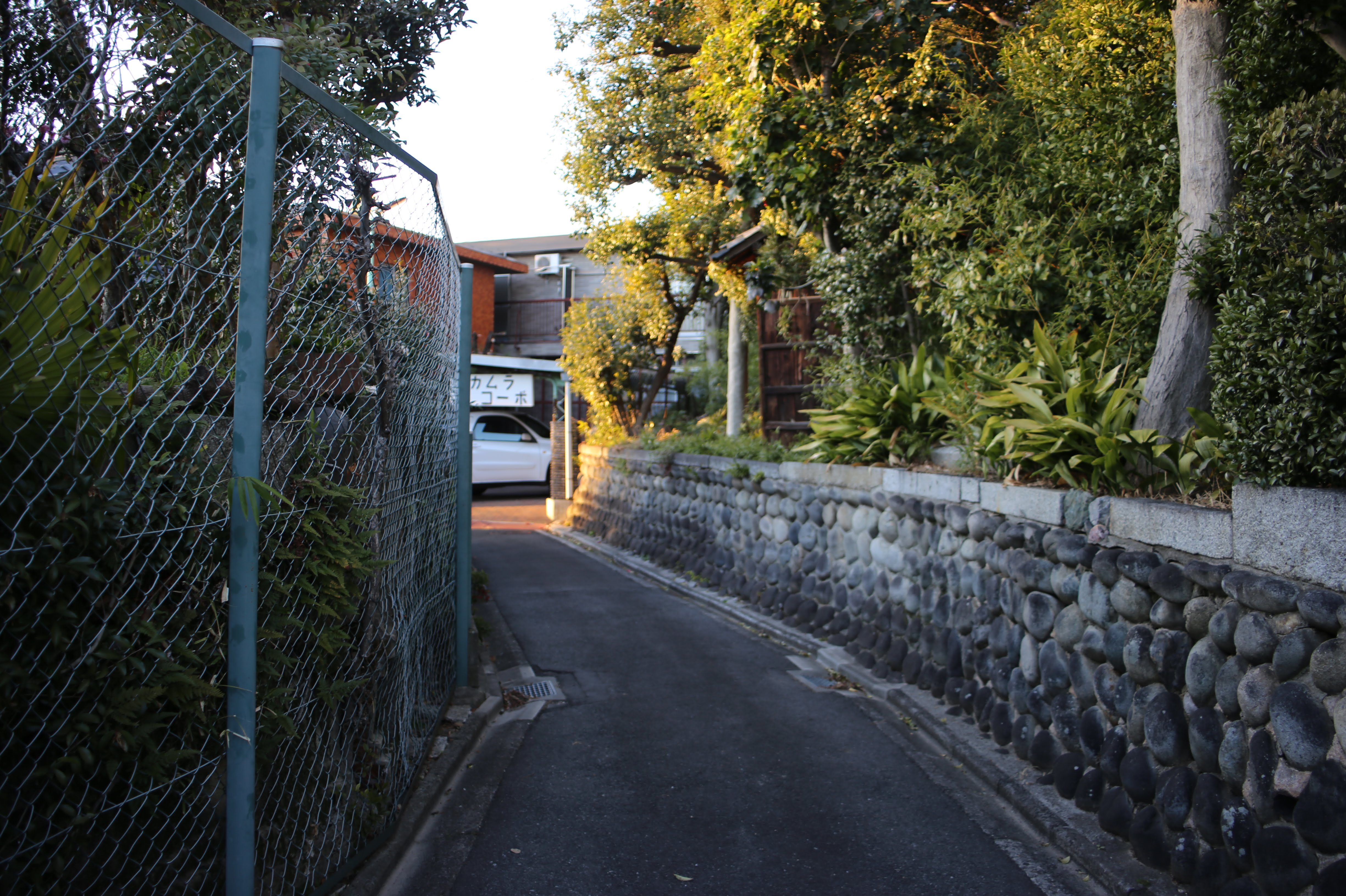 名古屋市瑞穂区井戸田町内の道路の様子（鎌倉街道の一部）